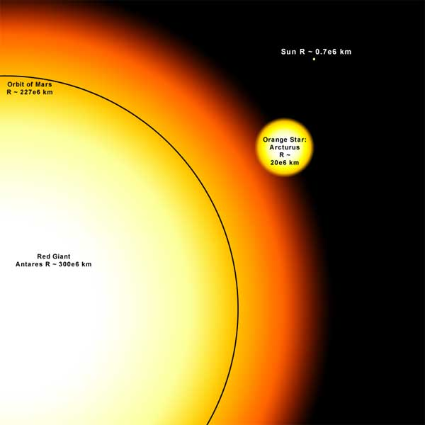 Tamaños comparativos de algunas gigantes y el Sol